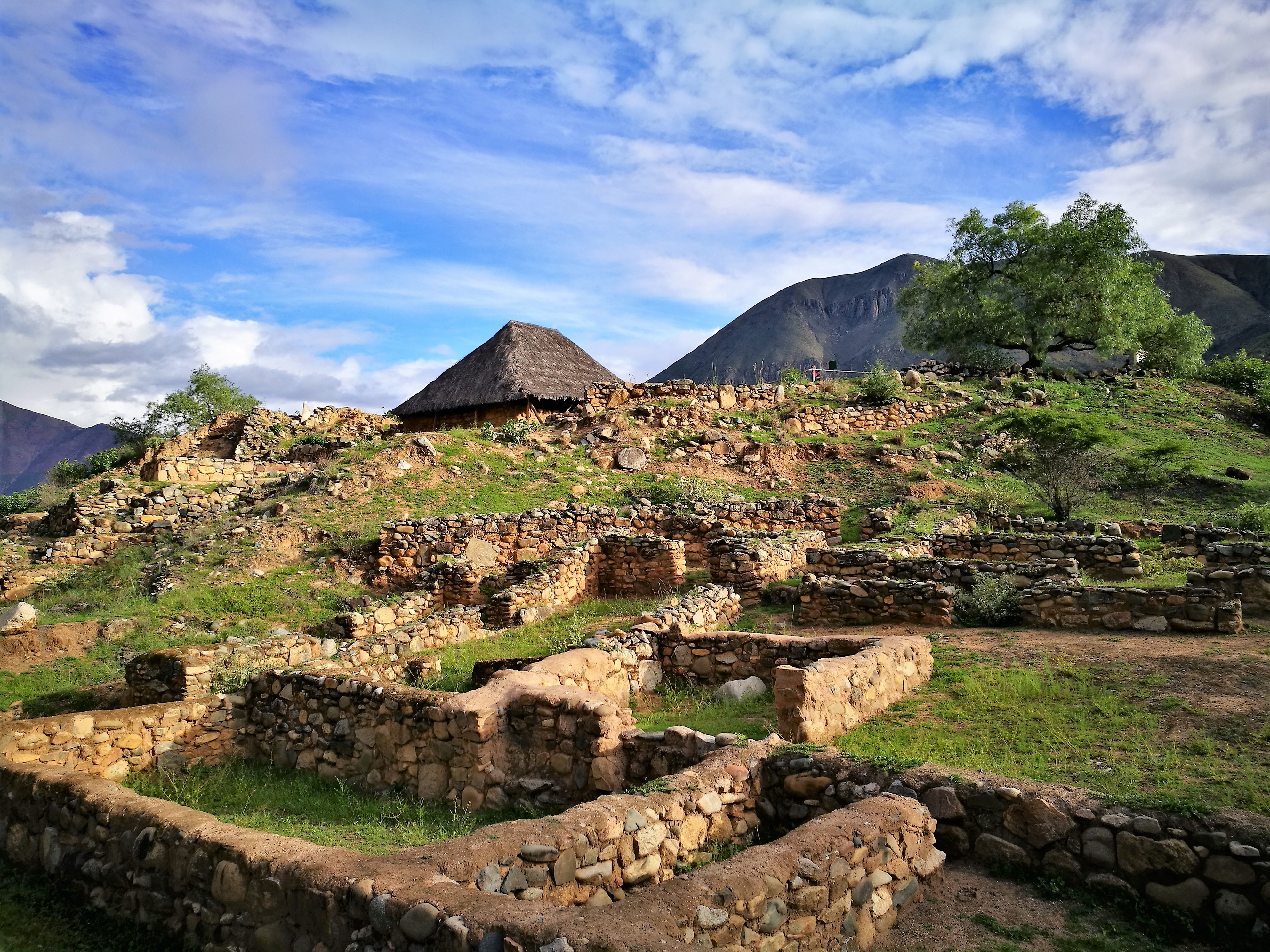 Templo Blanco de Kotosh amb l'edifici del Templo de las Manos darrera02